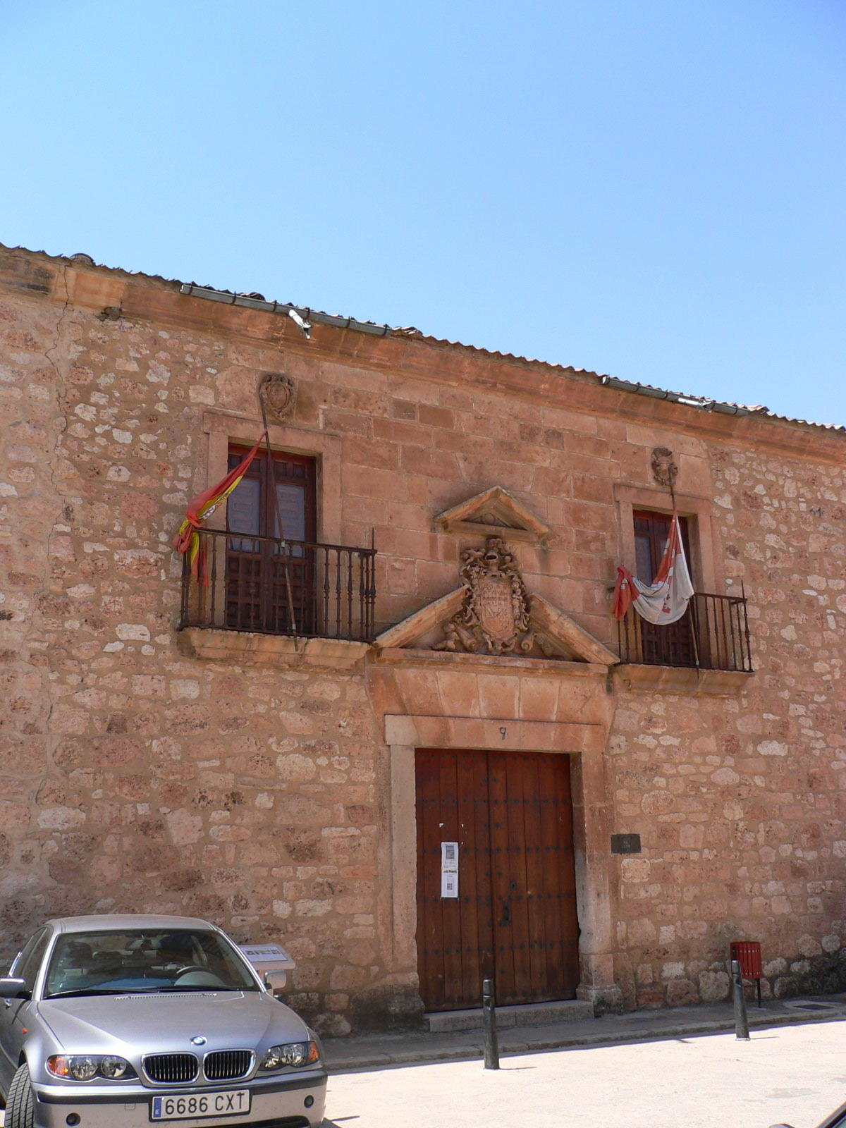 la casa-palacio del "Obispo Vellosillo" , data del siglo XVI, con patio interior, escalinata de piedra y artesonados de la época. En la portada podemos ver el escudo de los Vellosillo, así como en cada una de las ventanas y balcones.